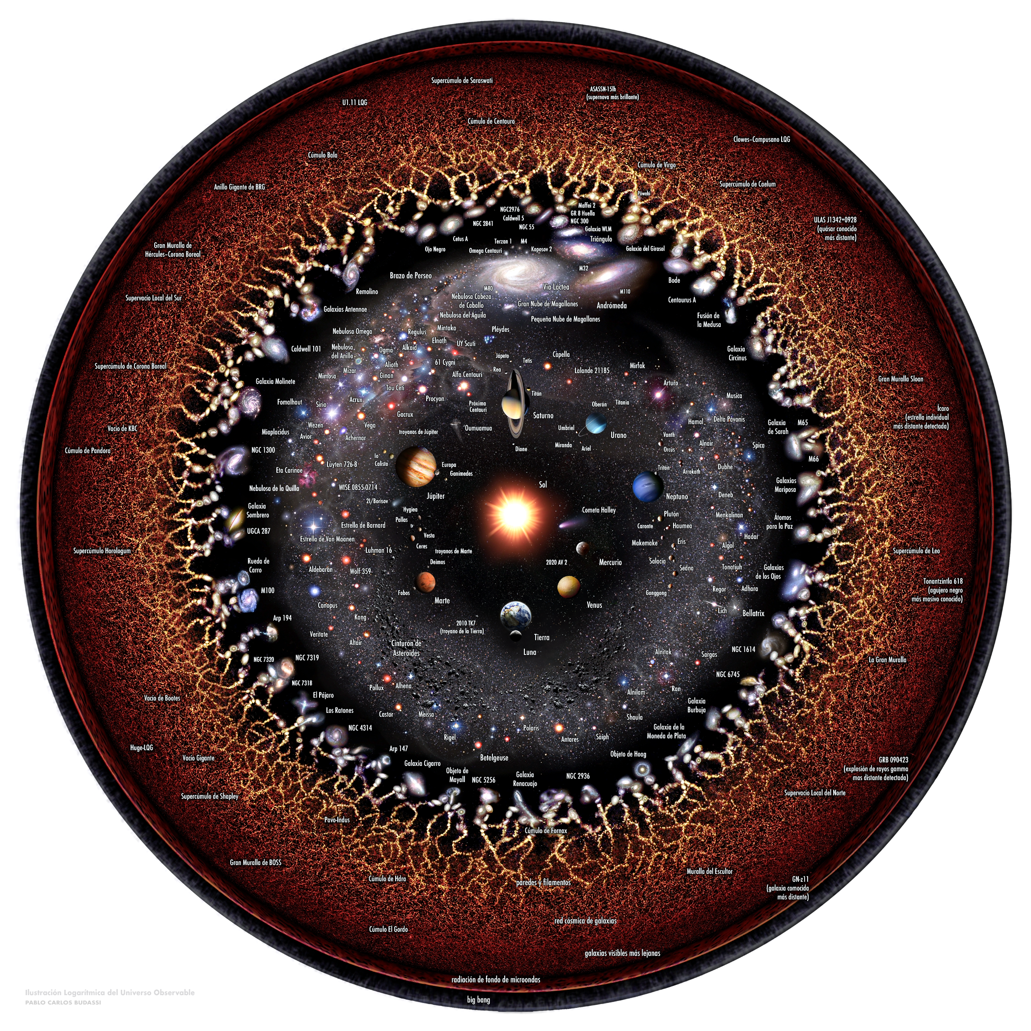 Representación en escala logarítmica del universo observable con el Sistema Solar en el centro (planetas internos y externos) objetos del cinturón de Kuiper, Alpha Centauri, Brazo Perseo, galaxia de la Vía Láctea, galaxia de Andrómeda, galaxias cercanas, red cósmica, radiación cósmica de microondas y el plasma (invisible) del Big Bang en el borde. La distancia desde la Tierra aumenta exponencialmente desde el centro hasta el borde. Los cuerpos celestes se muestran agrandados para apreciar sus formas.